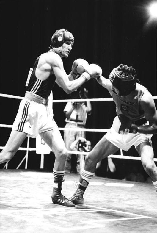 Andreas Otto, Orsubek Nasarow ADN-ZB Oberst 6.8.89 Berlin: 20. Internationales Boxturnier-Im Finale der Halbweltergewichtsklasse wurde der 25jährige Frankfurter ASK-Boxer Andreas Otto (l) knapper aber verdienter Punktsieger (66:60 Computerwertung) über den Europameister von 1987 und dreifachen sowjetischen Landesmeister, Orsubek Nasarow (23 J.). Er konnte damit seinen Vorjahreserfolg wiederholen.